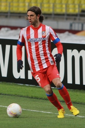 Доминго Сисма Гонсалес игрок ФК Атлетико Мадрид